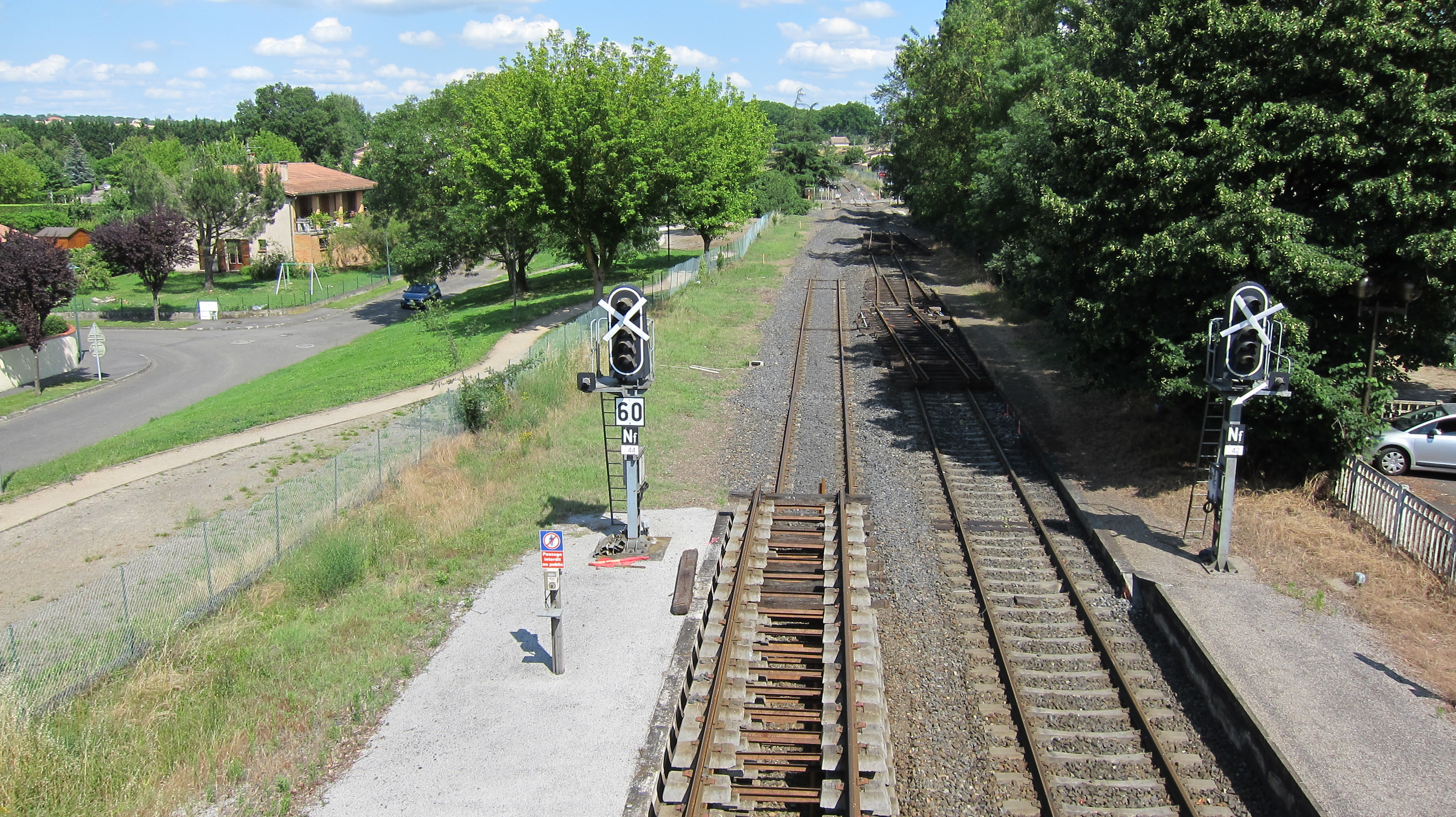 Montrabé (Haute-Garonne, France) : La gare pendant le doublement de la ligne.